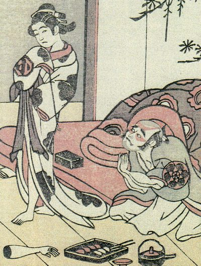 Hanazumō Genjibīki (花相撲源氏張胆)